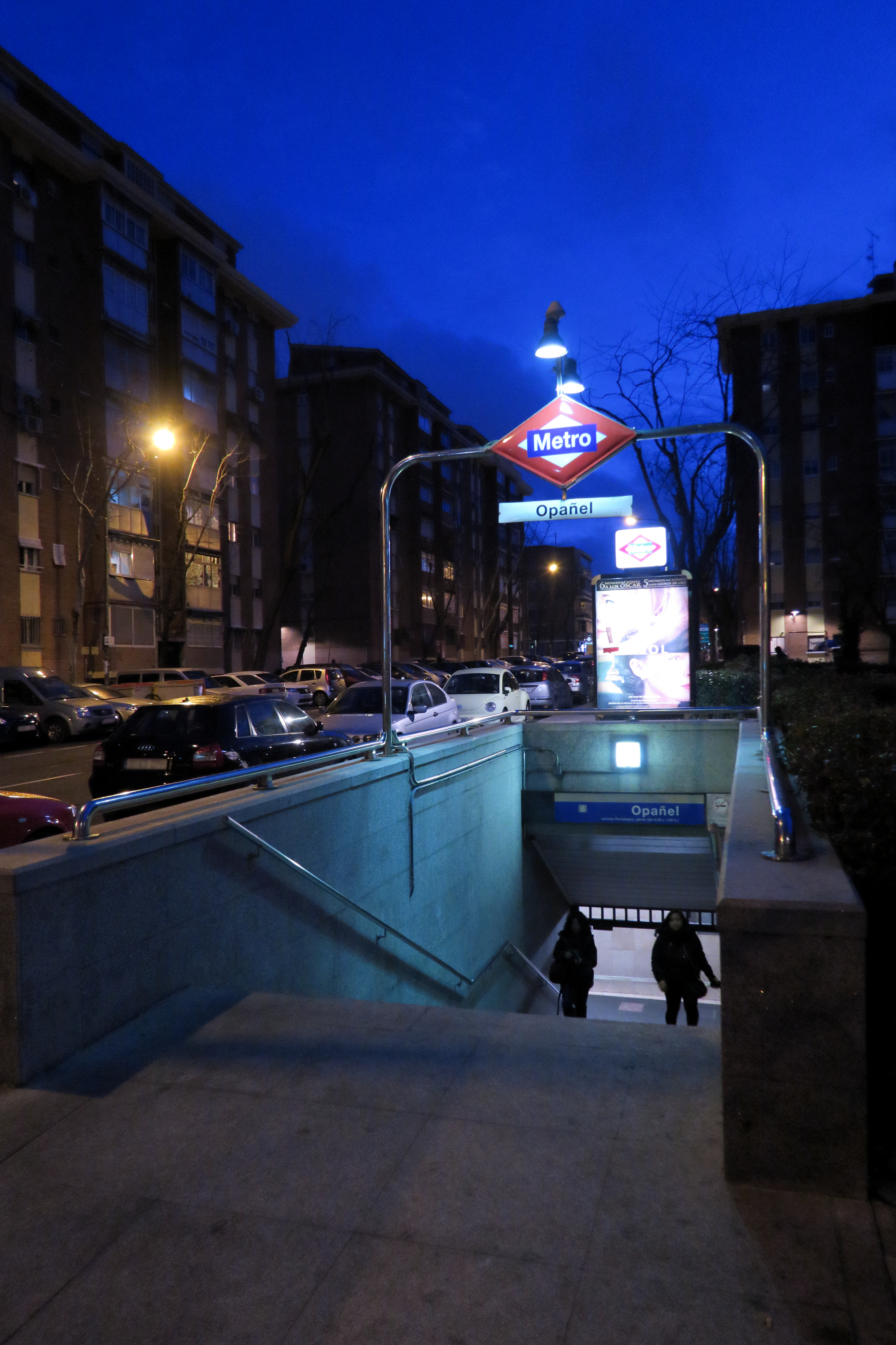 Estación de Opañel